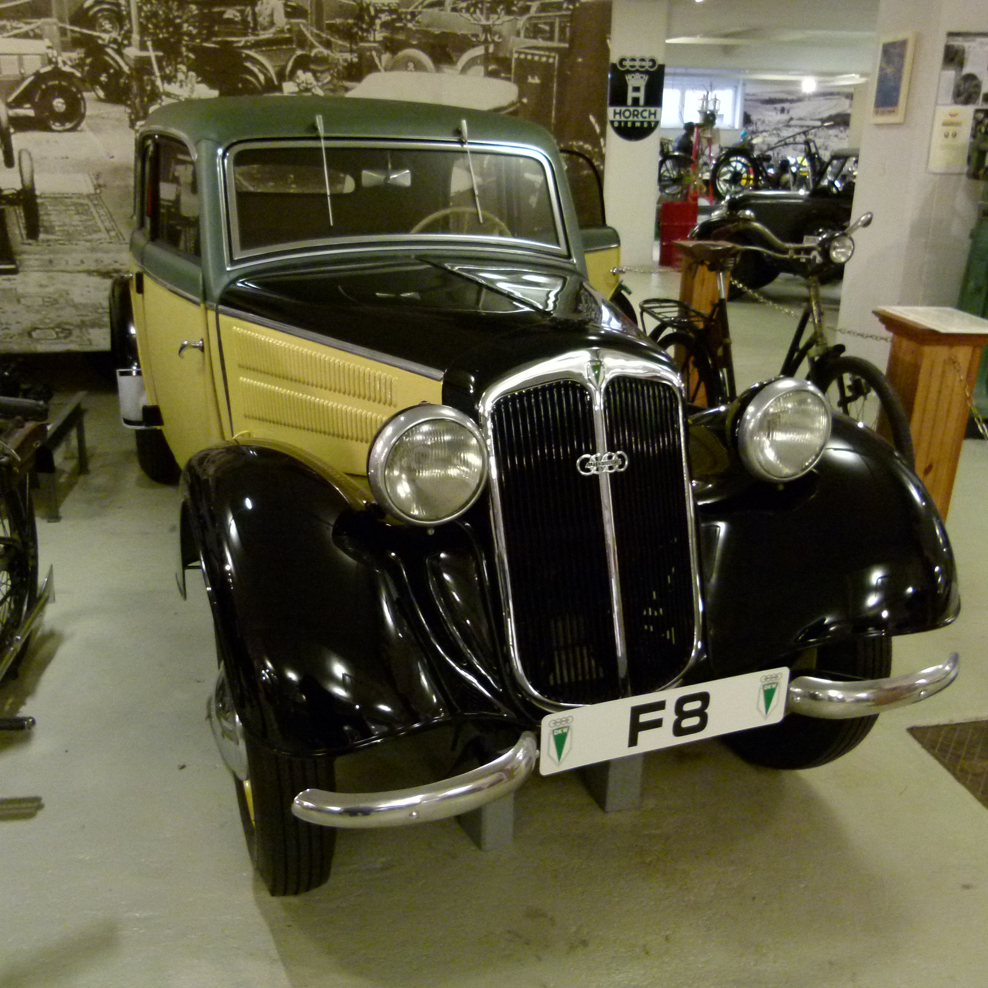 DKW F8 Viertürer, 1939, Fahrzeugmuseum Chemnitz